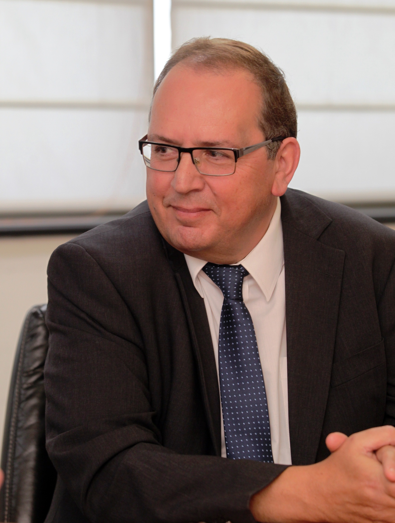 עופר בלוך מנכ"ל חברת החשמל